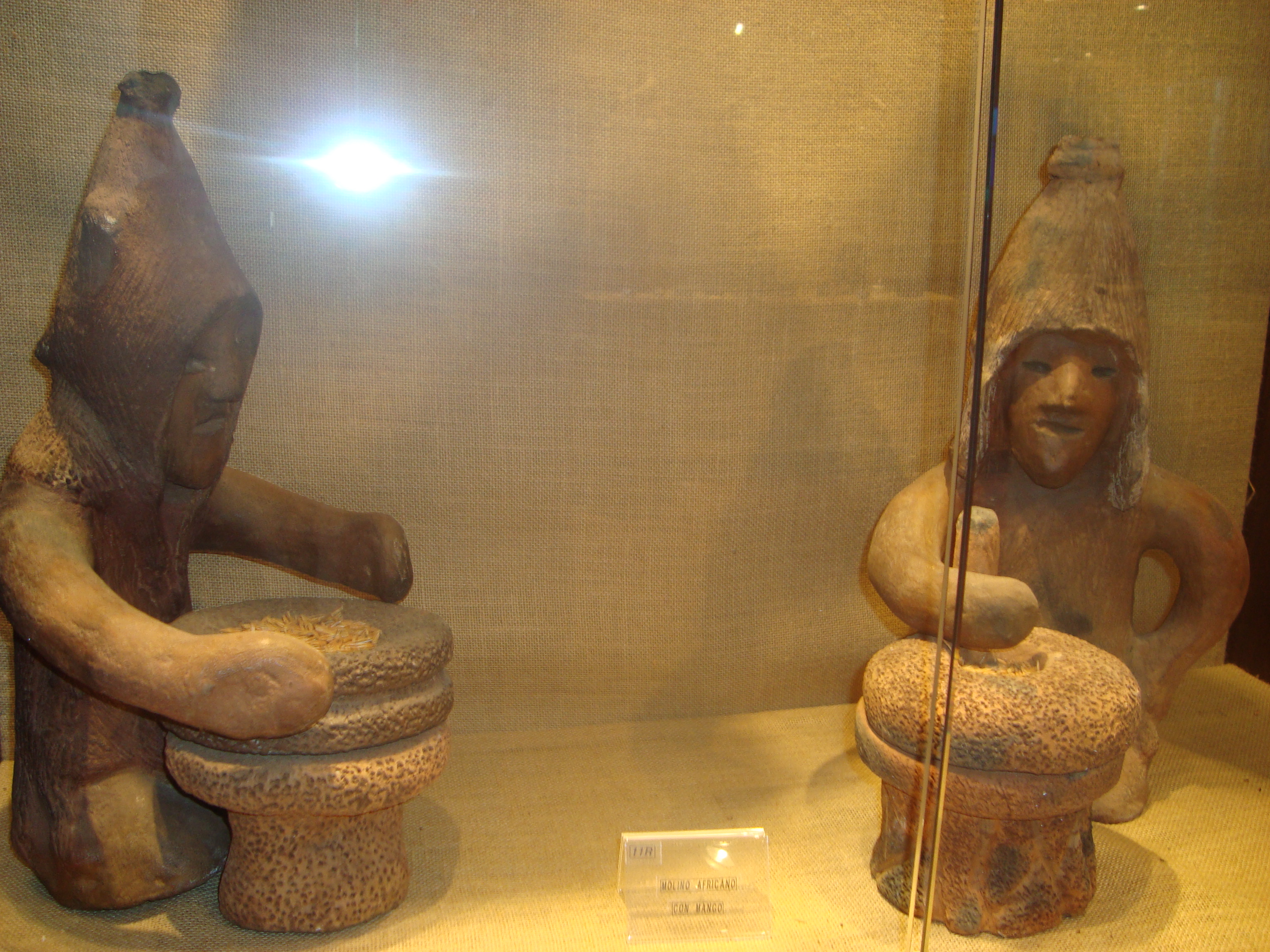 Cerámica elaborada por Juan Brito que representa el trabajo de la molienda de grano por parte de los aborígenes de Lanzarote (majos) para elaborar el tradicional gofio.